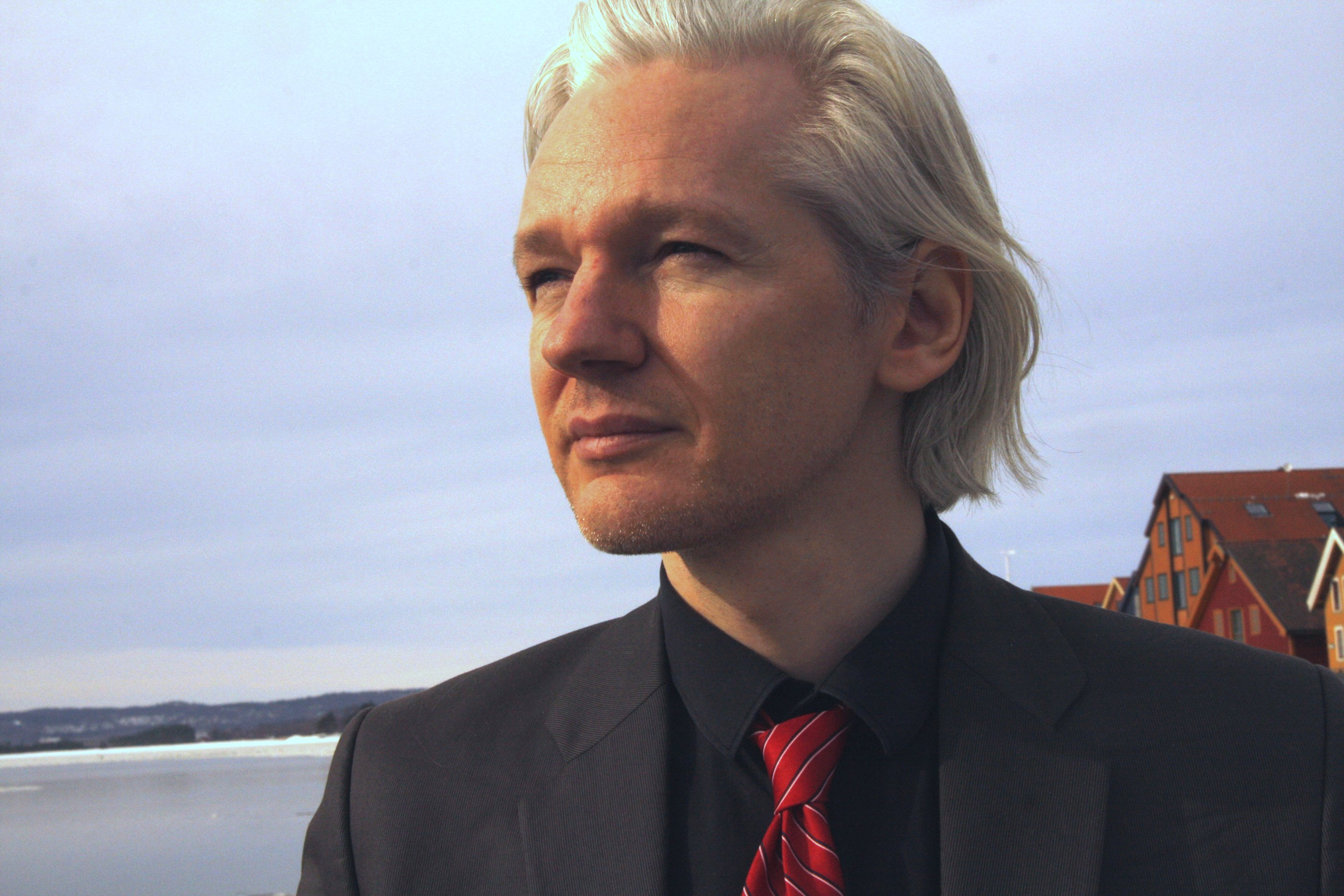 Julian Assange